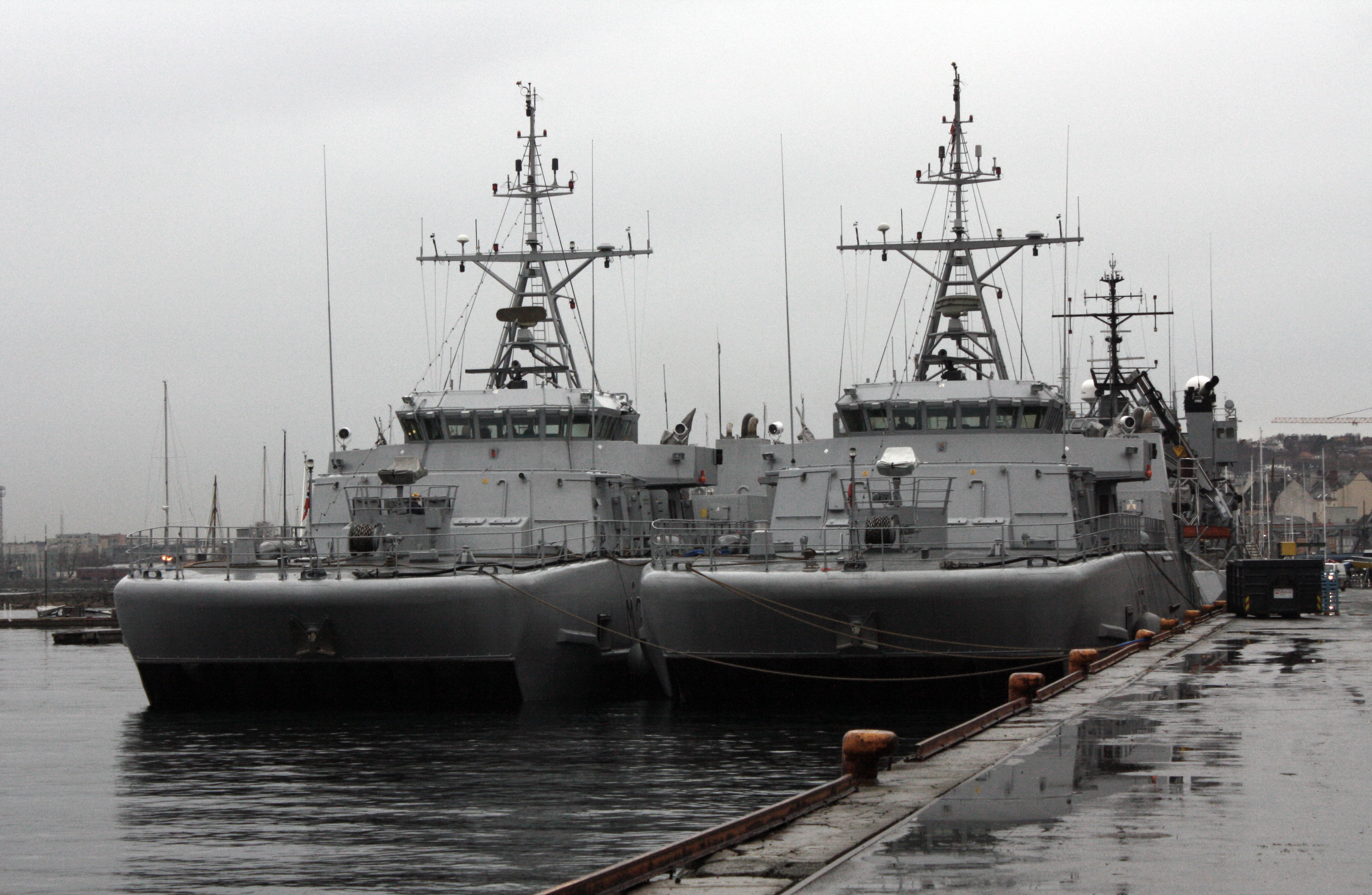 KNM Otra og KNM Hinnøy fra minevåpenet i Forsvaret, fortøyd i Ila i Trondheim.